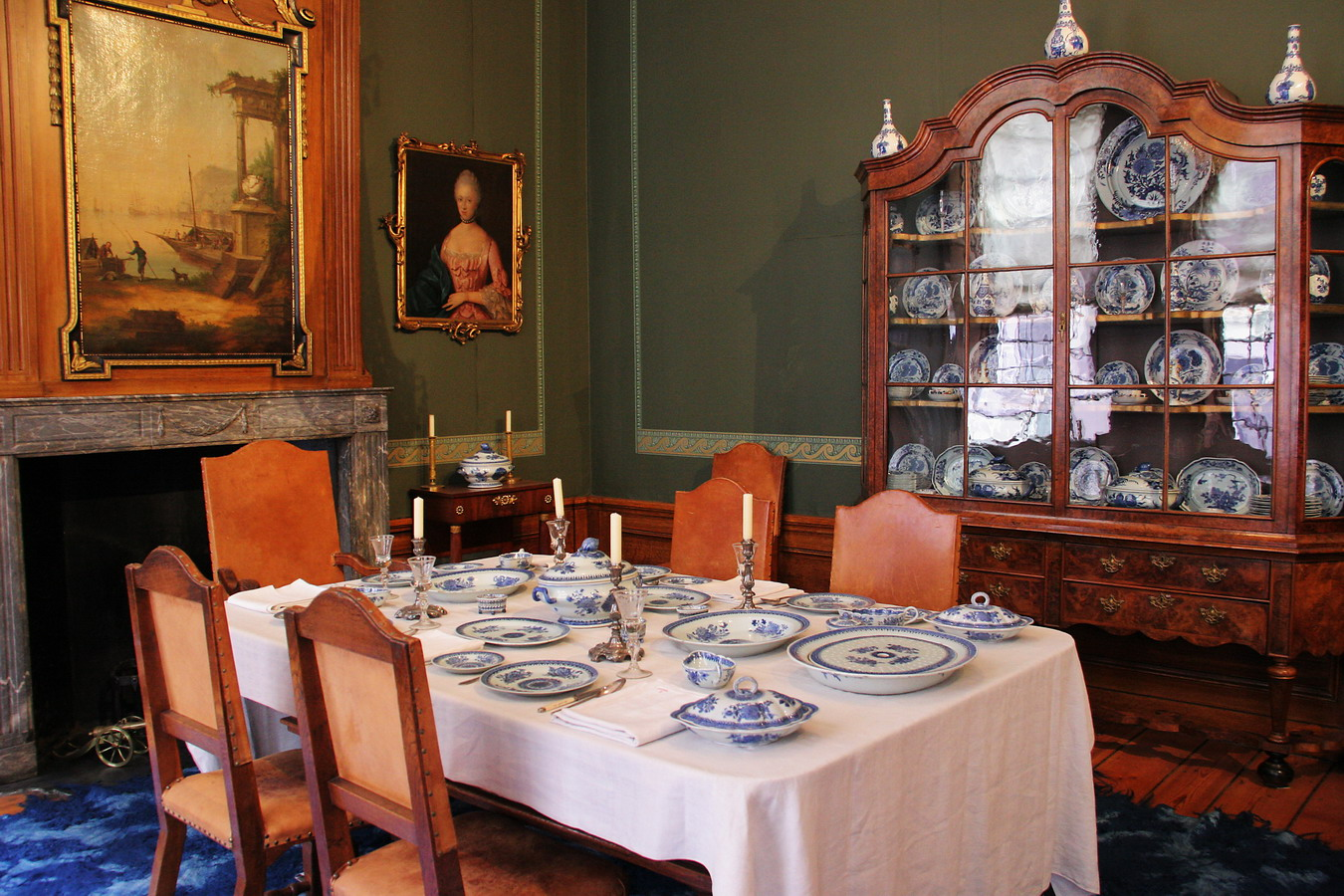 Stijlkamer van het Eysingahuis Stijlkamers van het Eysingahuis 10